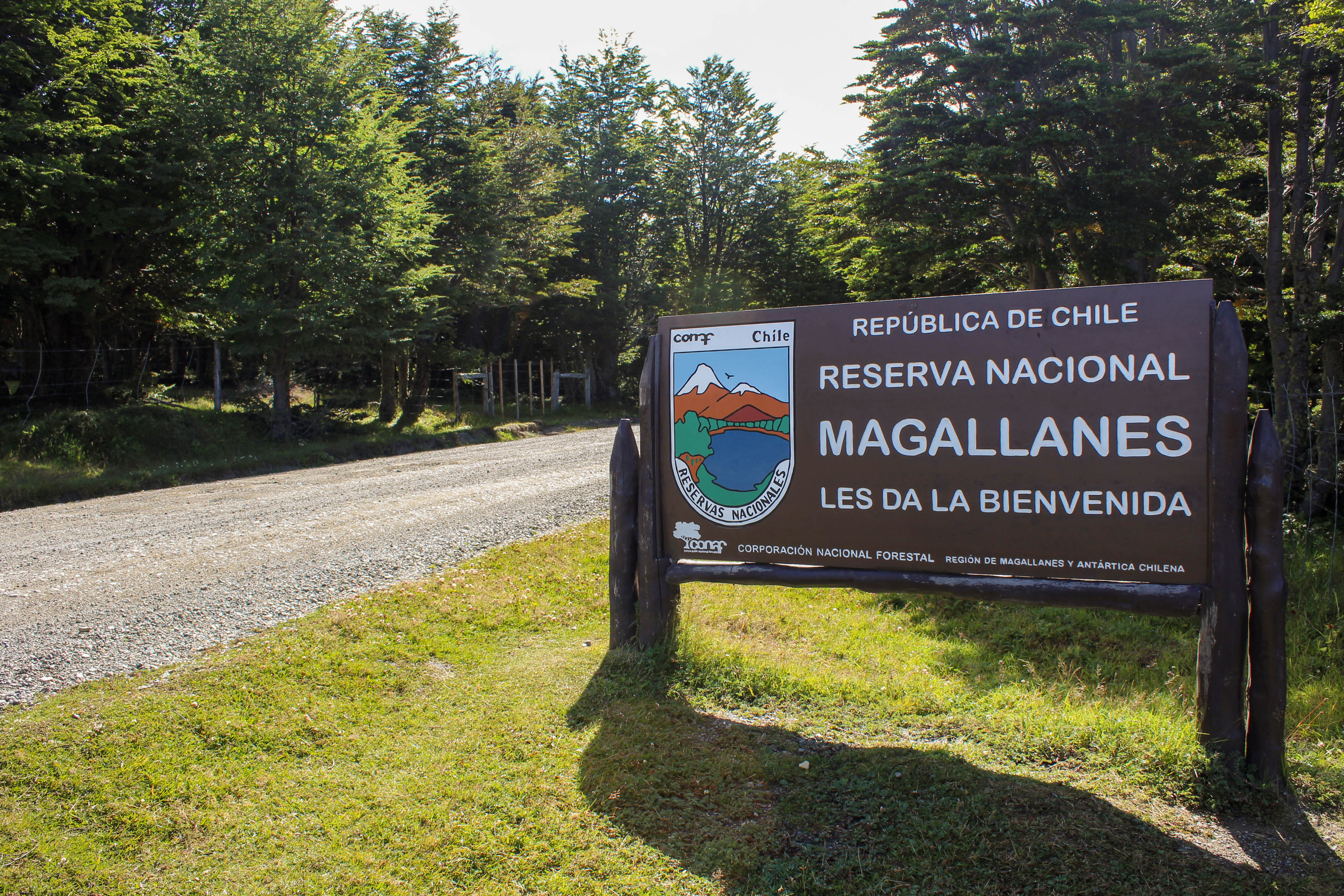 Reserva Nacional Magallanes, Región de Magallanes, Chile.